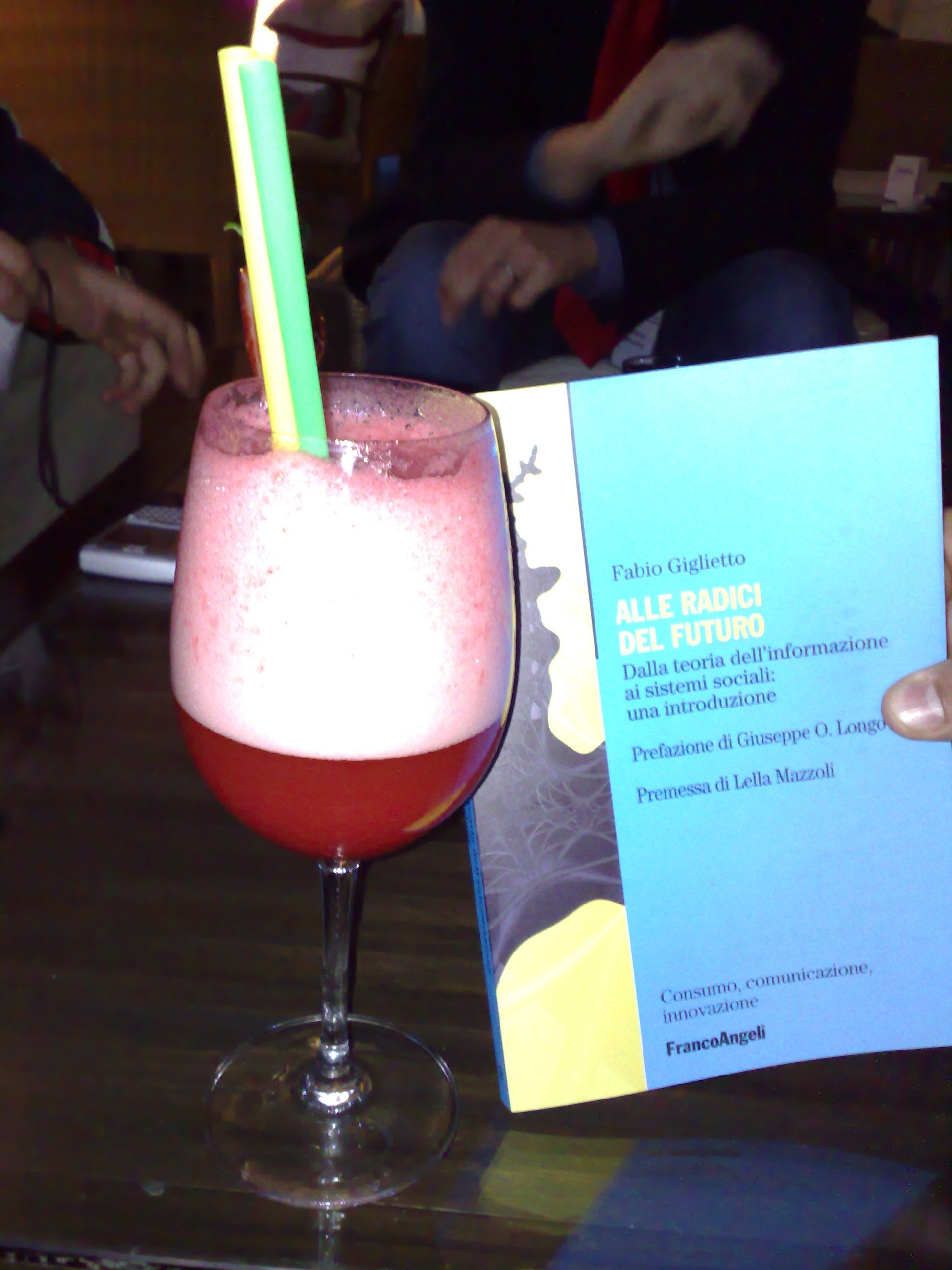 Un Rossini, grazie